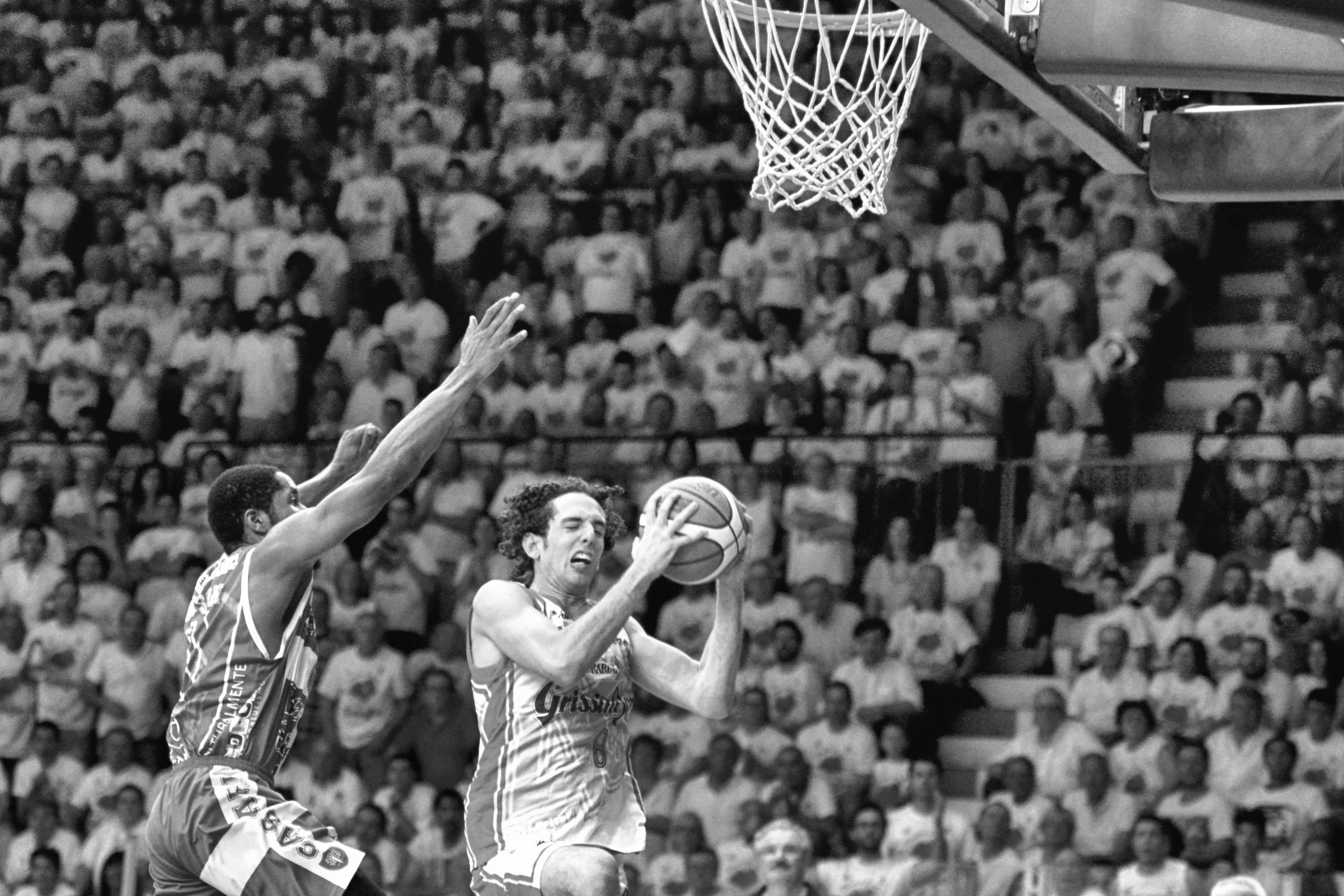 Amedeo Della Valle in azione con la maglia di Reggio Emilia